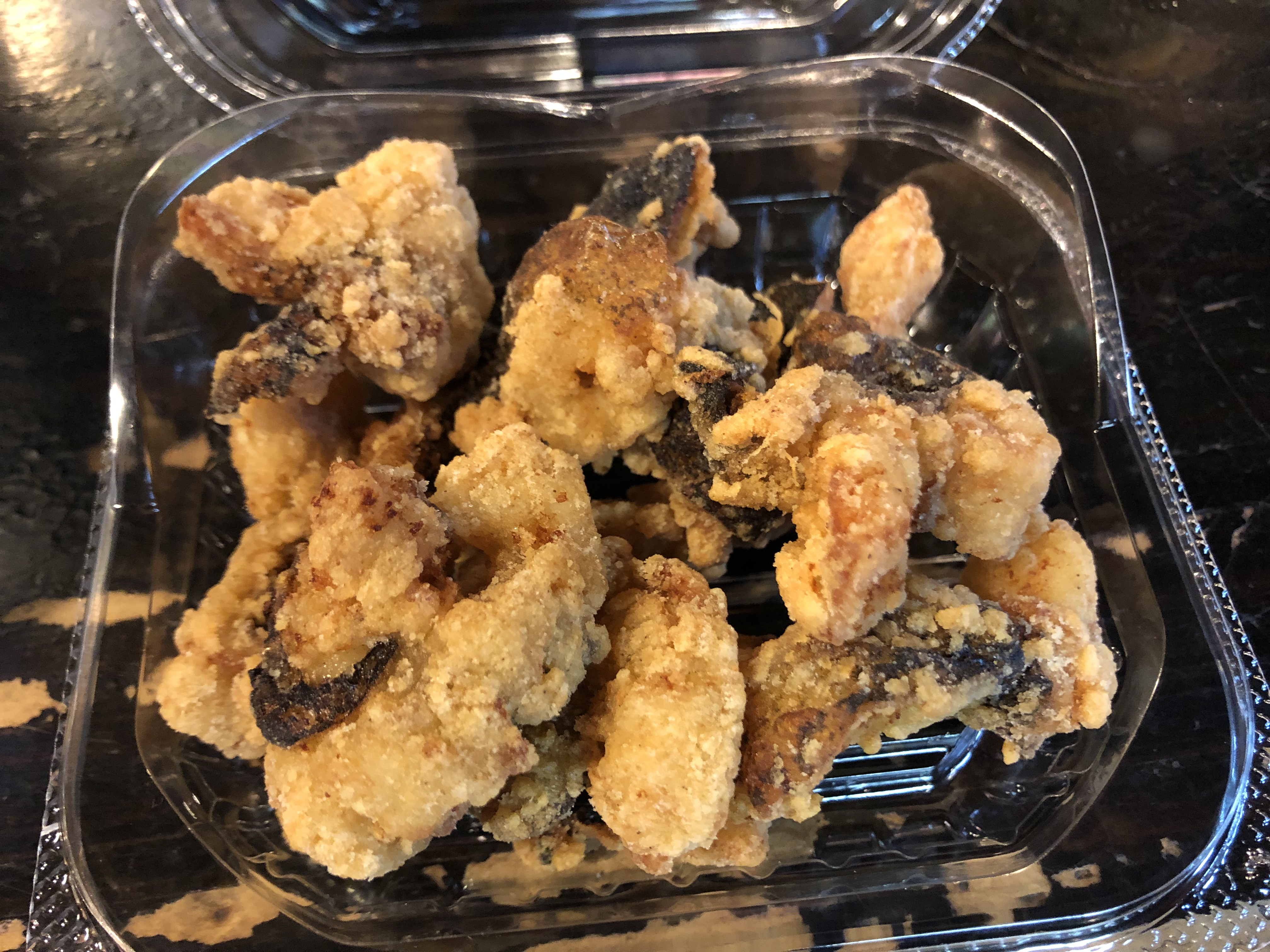 ウツボのja:唐揚げ。ひろめ市場にて。